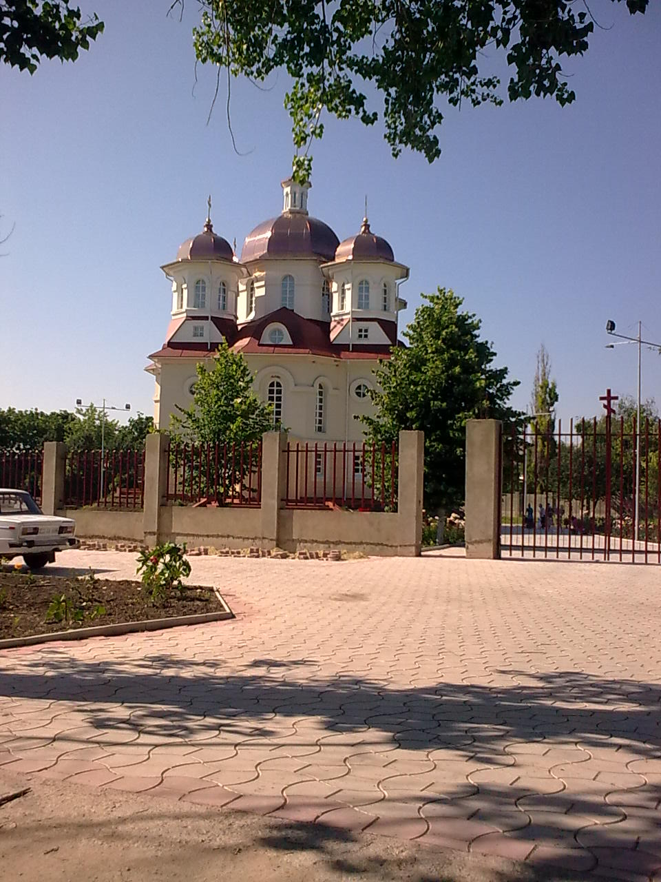 Catedrala Sfântului Mare Mucenic Dumitru din oraşul Cupcini